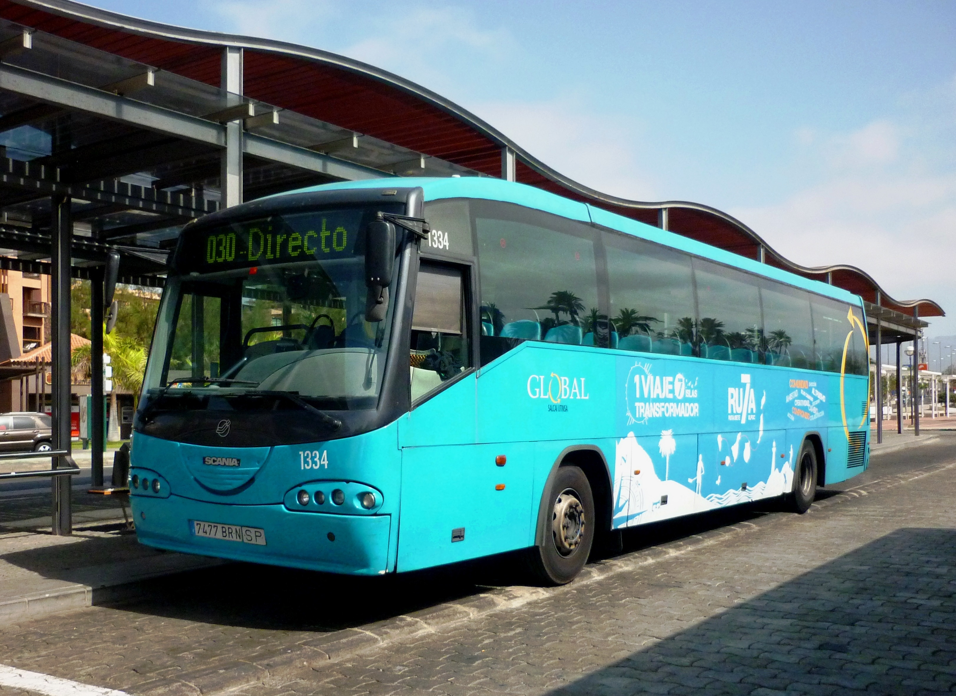 1334_Global